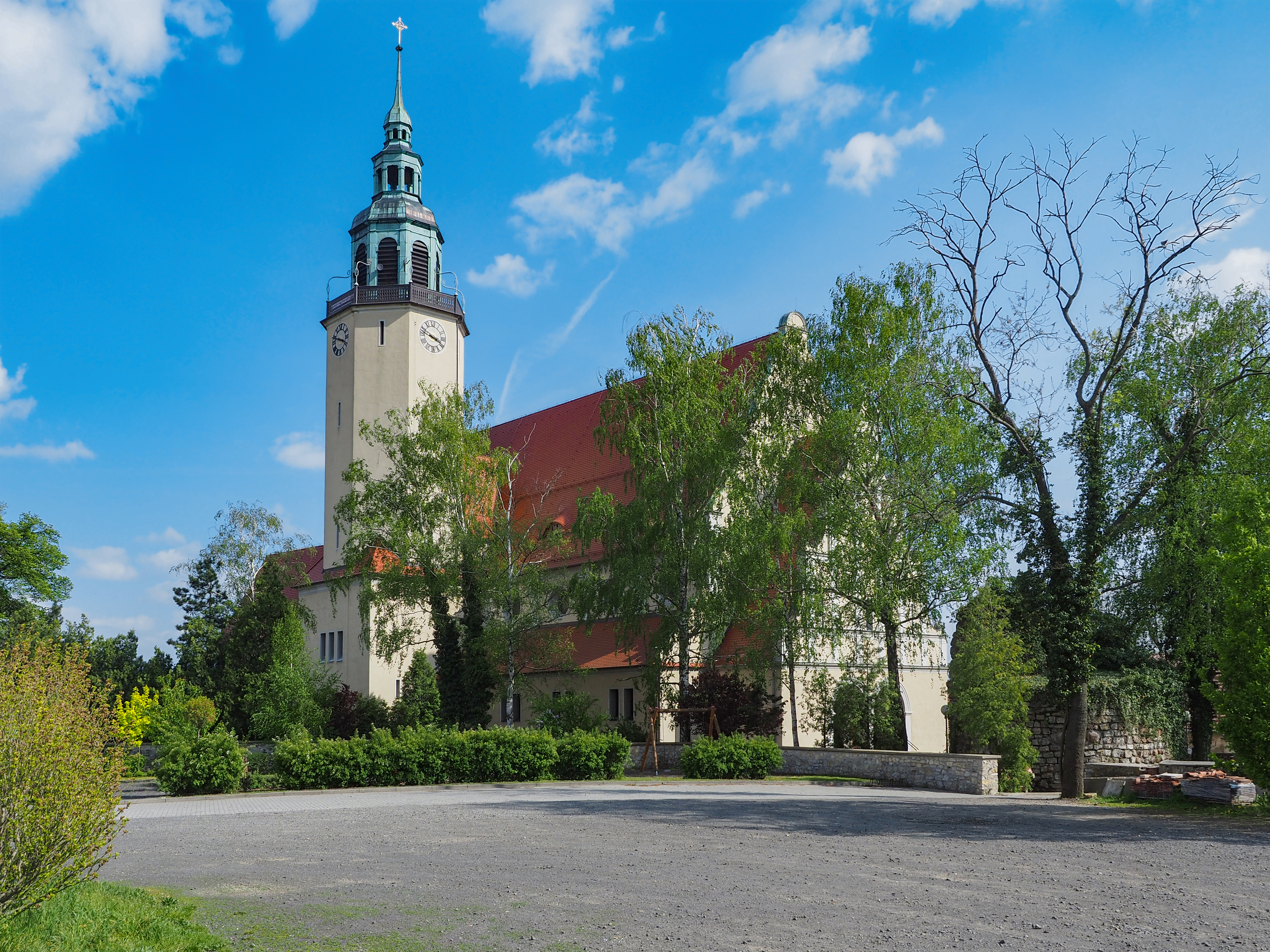 Chrząszczyce, Kościół Matki Boskiej Szkaplerznej w Chrząszczycach